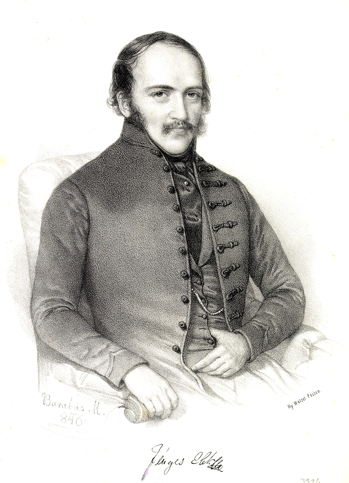 Fényes Elek (1807-1876) közgazdász, statisztikus litográfia portré 19. sz.